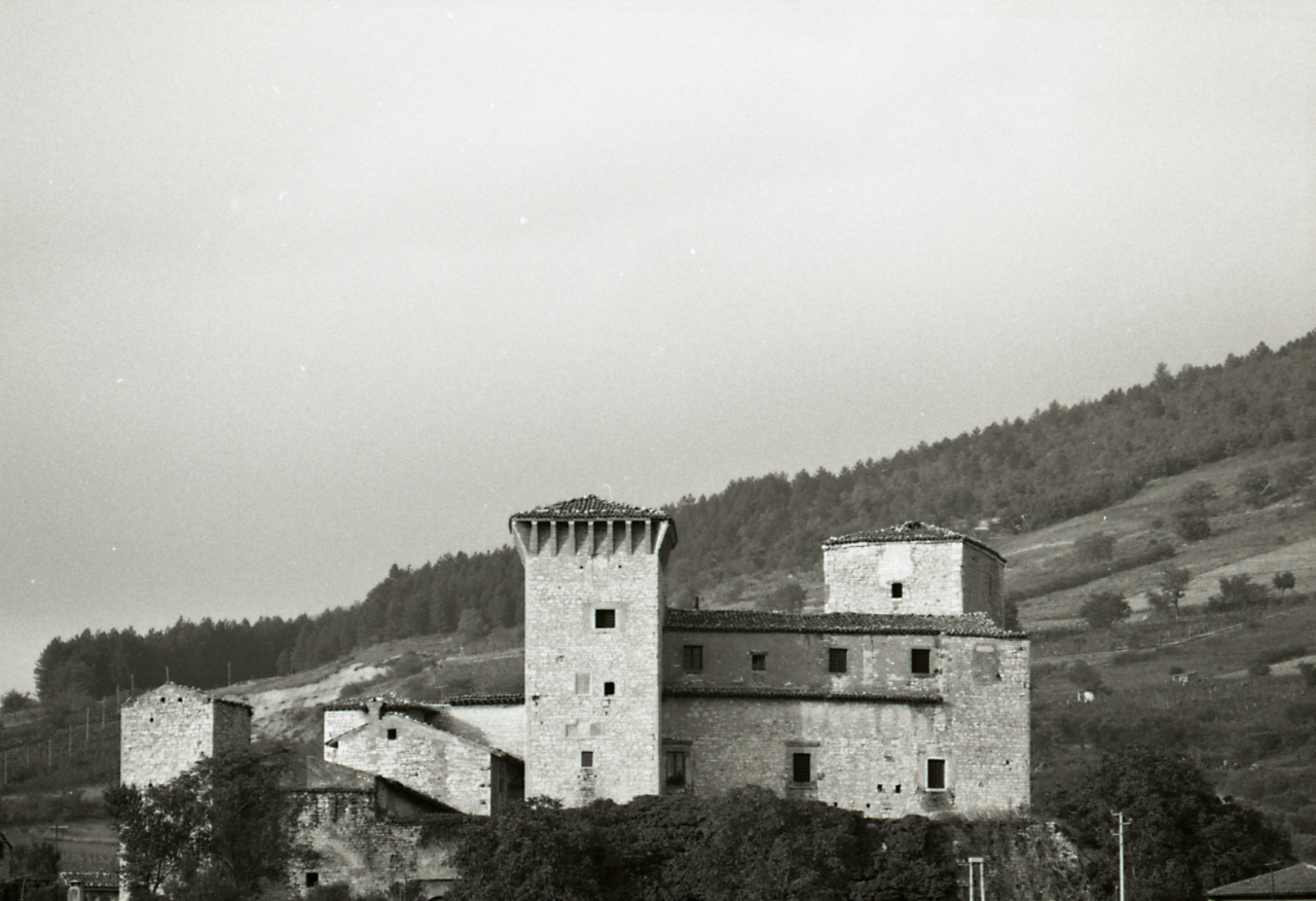 Servizio fotografico : Gualdo Tadino, 1967 / Paolo Monti. - Strisce: 1, Fotogrammi complessivi: 4 : Negativo b/n, gelatina bromuro d'argento/ pellicola ; 35 mm. - ((I fotogrammi hanno una doppia numerazione. . - Sul portanegativi: Nikon Plus X. - Sul dorso del portanegativi Monti specifica: "T.C.I.". - Occasione: Documentazione per la pubblicazione: Umbria, Milano, TCI, 1969. - Fonte: Agenda di Paolo Monti: Monti/ 3 aprile 1966 - 9 marzo 1971/ 12421-16823 (1966-1971), presso Archivio Paolo Monti